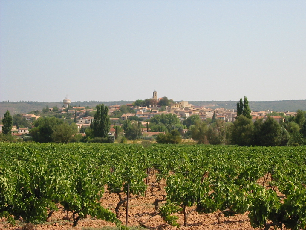 Vue d'ensemble du village de Pourrières (Var) Photo personnelle, prise le 10.08.2003 Cham